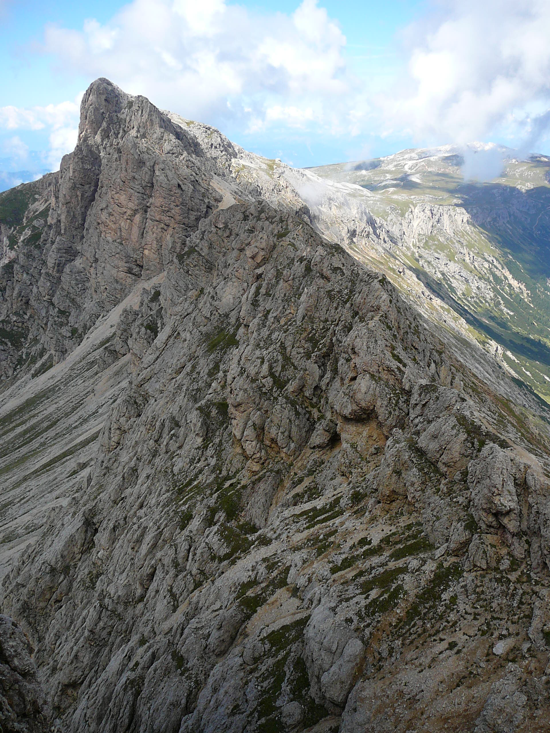 ferrata maximilian